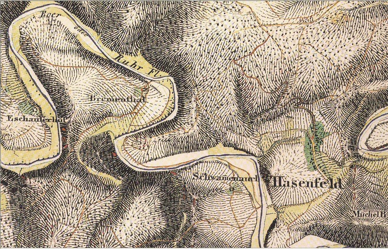 Kartenaufnahme des Rurtales bei Heimbach/Schwammenauel durch Tranchot und von Müffling (1803-1820).